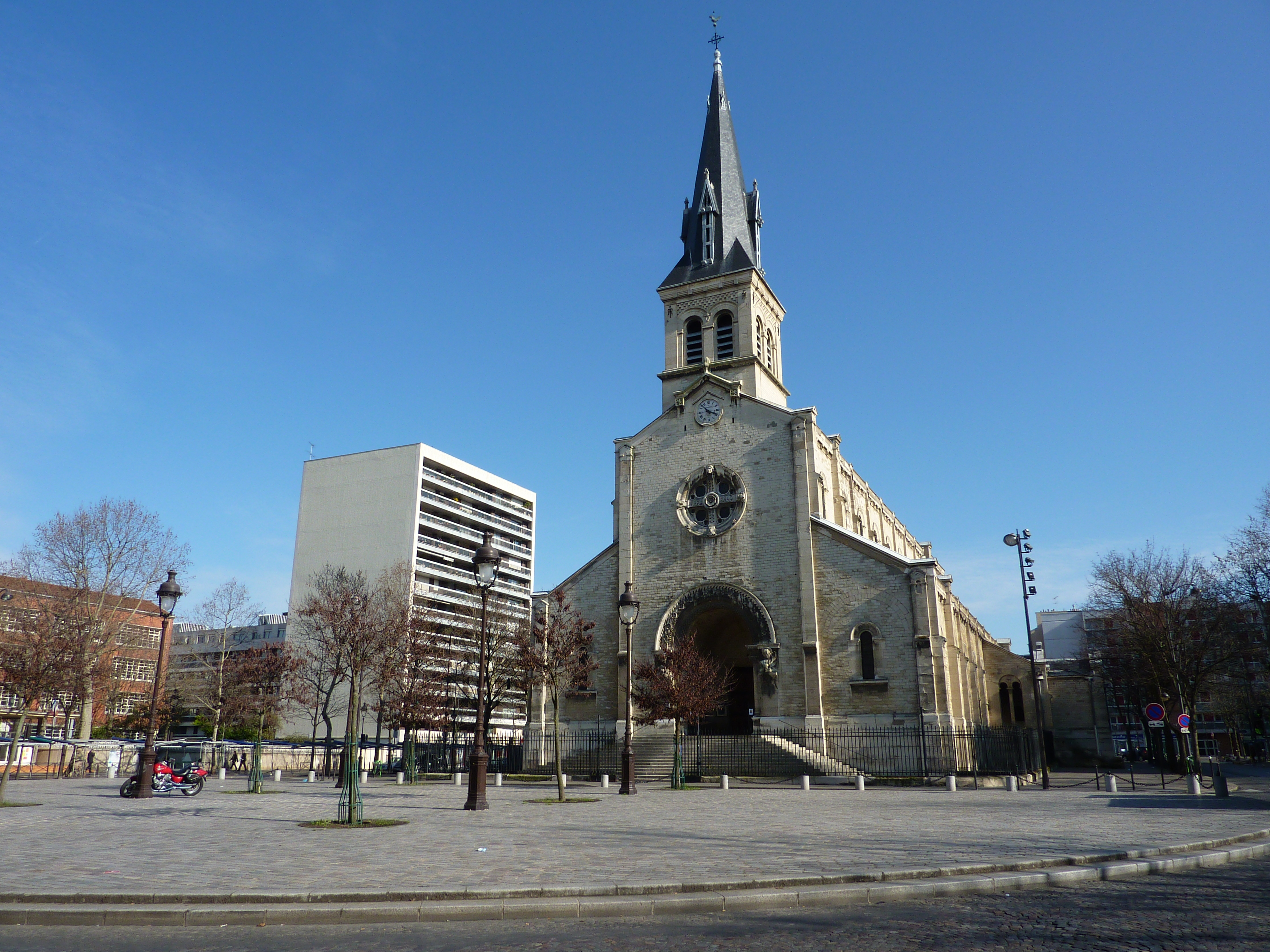 Eglise Notre-Dame de la Gare, 75013, Place Jeanne d'ARC